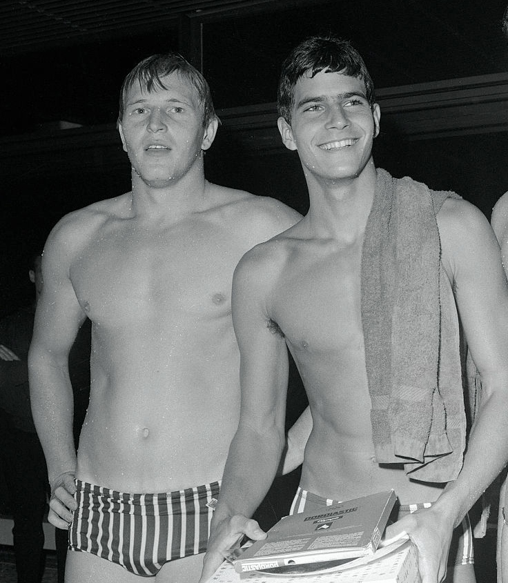 1967 Press Photo, Werner Freitag and Mark Spitz